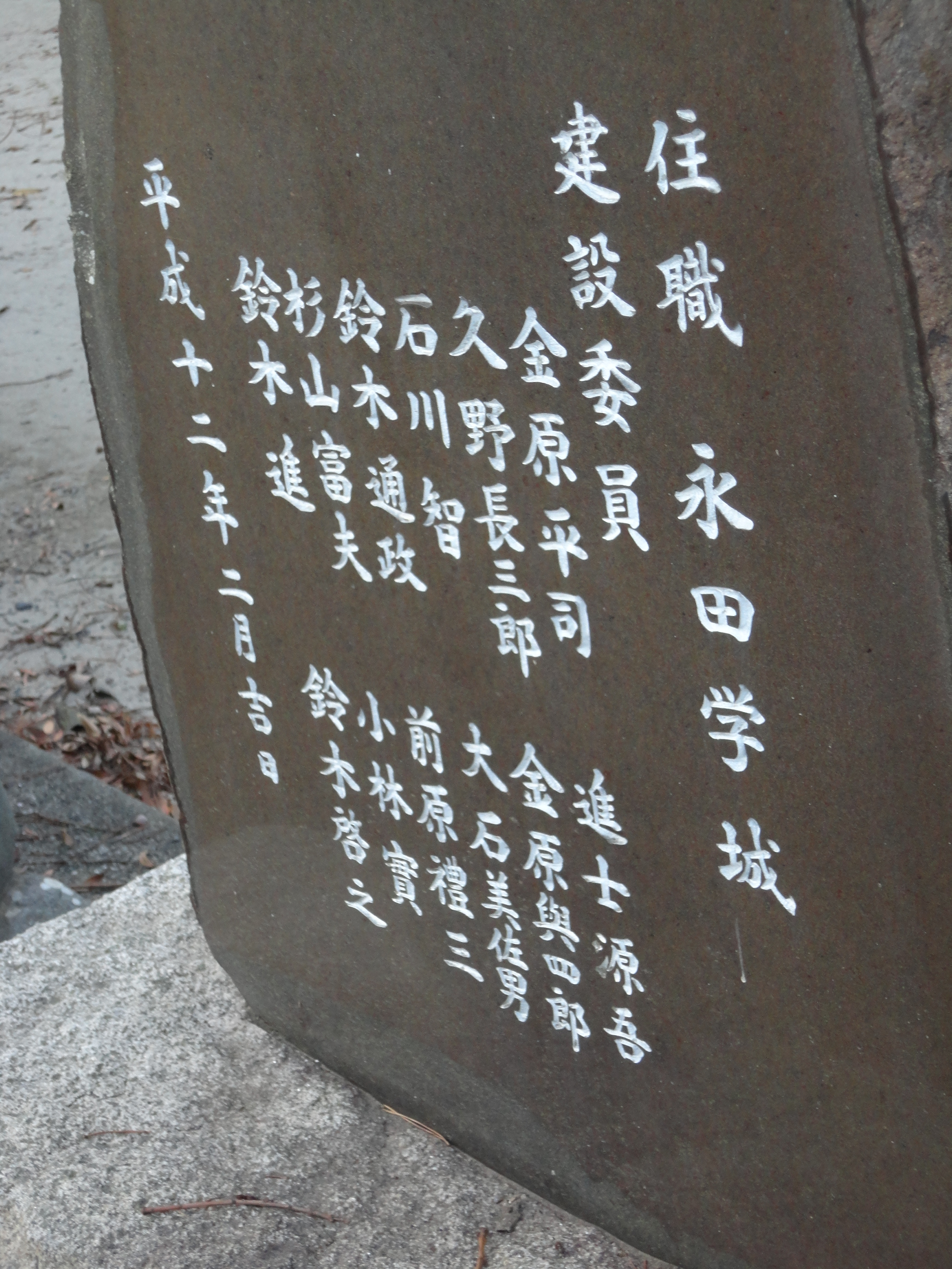 江岳寺敷地内にある碑文